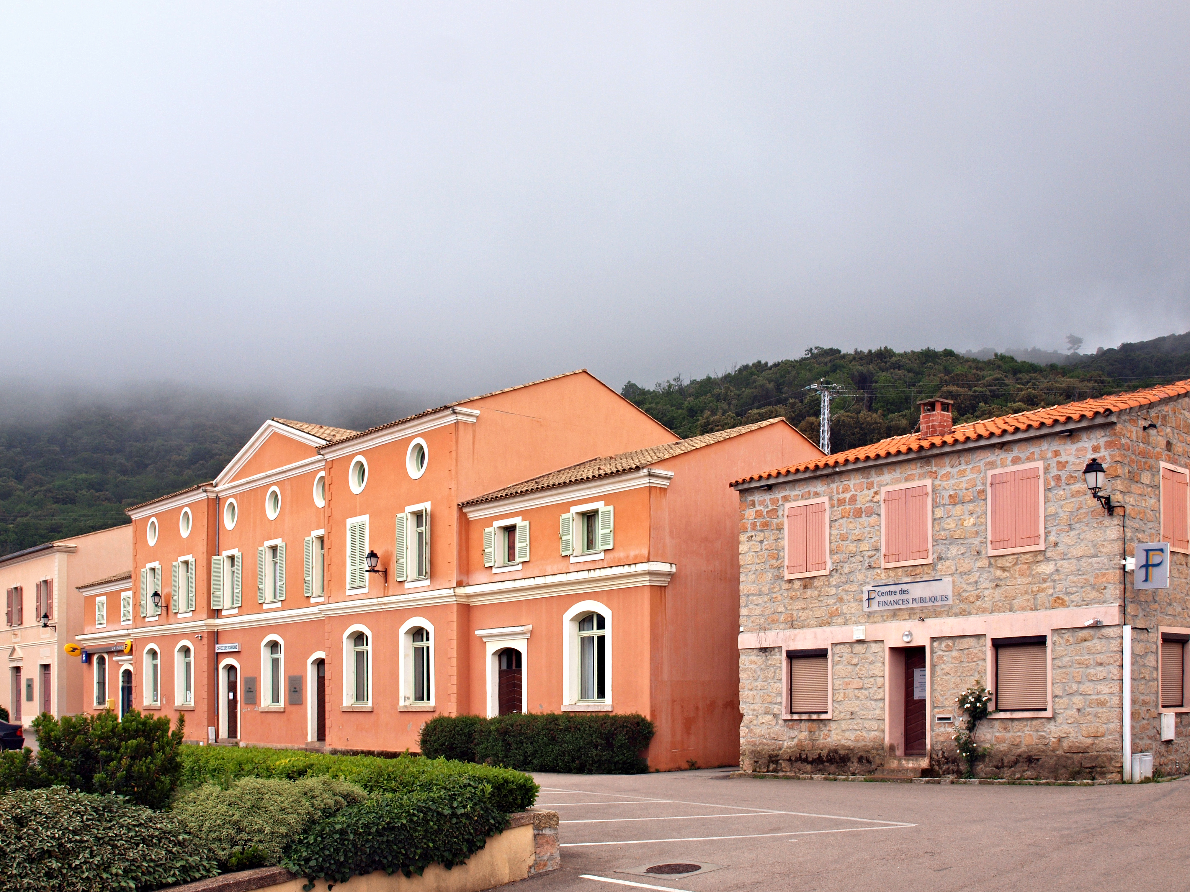 Piana, Ouest Corse (Corse) - La Poste,l'Office du Tourisme et le Centre des Finances publiques